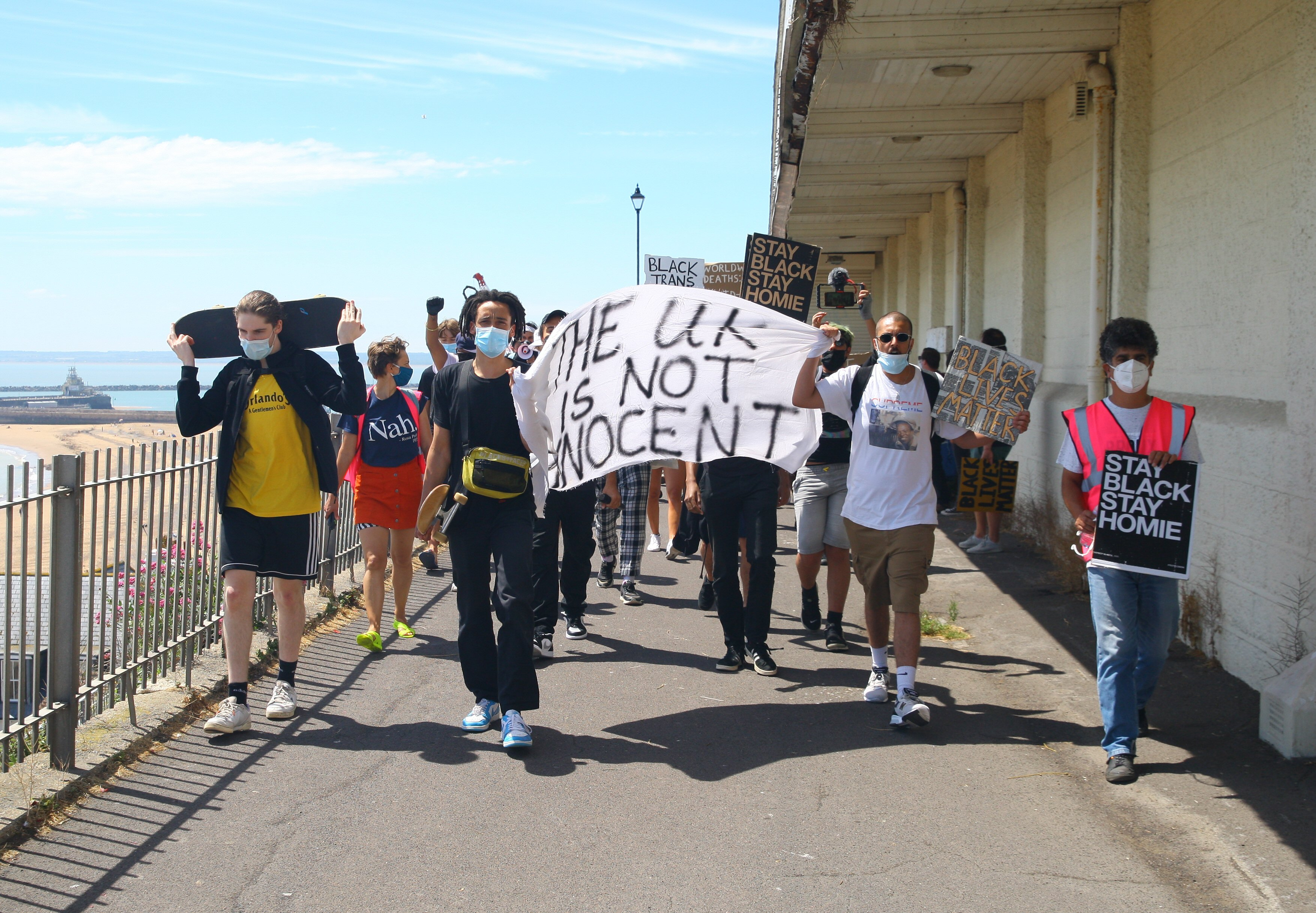 FDBY0263